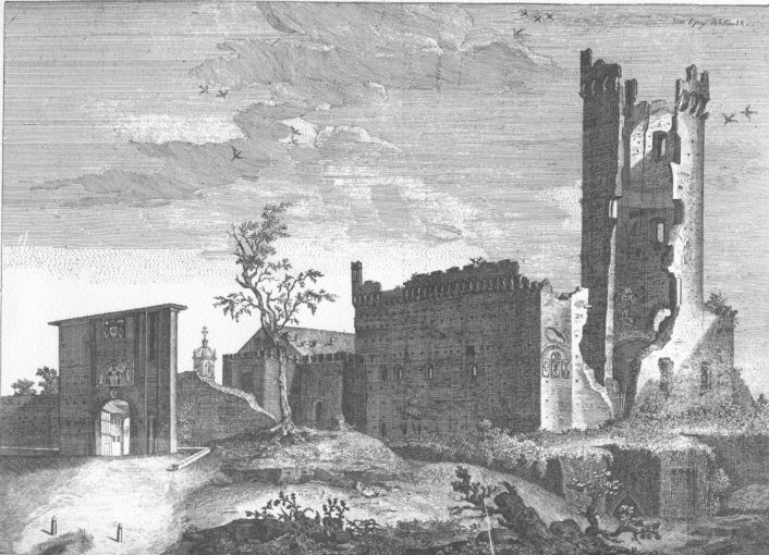 Porta Milano e le rovine del vecchio Castello Visconteo, a Monza